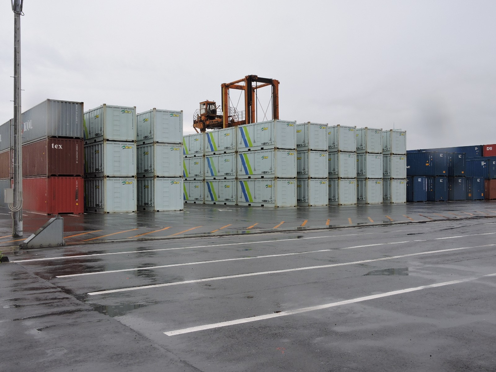 『 平成28年熊本地震 』 より発生した大量の災害廃棄物を、県外の廃棄物処理施設において広域処理するため、28年6月より熊本市内の仮置場においてコンテナに詰め込まれた災害廃棄物を、井本商運株式会社が熊本港から三重県の廃棄物処理施設に向けて、大阪港まで海上輸送する。 画像は、熊本港コンテナターミナルに積上げられた大量のコンテナ郡。